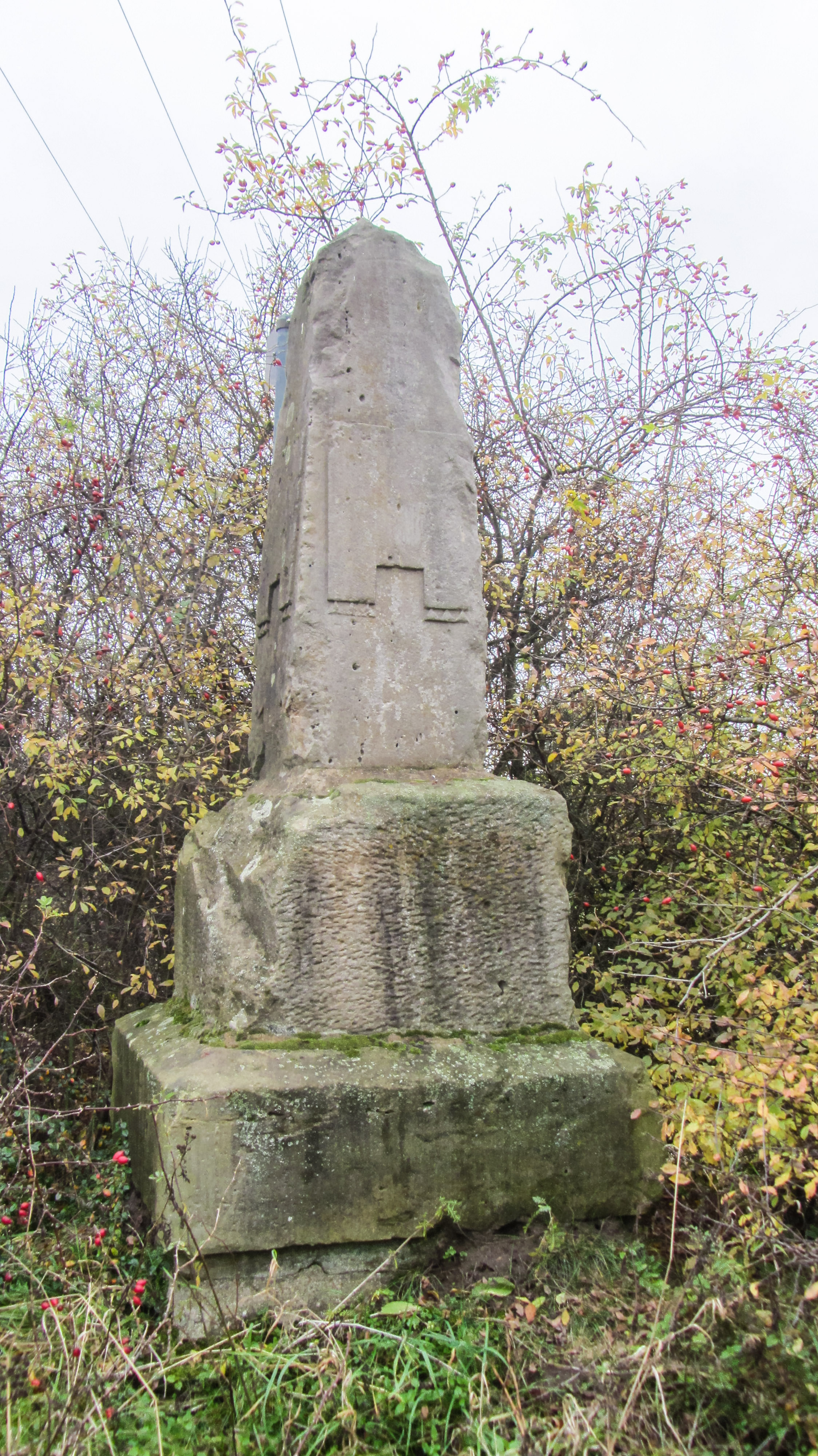 Preußischer Ganzmeilenobelisk an der K 1466 Einmündung K1484, in Hohenberg-Krusemark OT Altenzaun